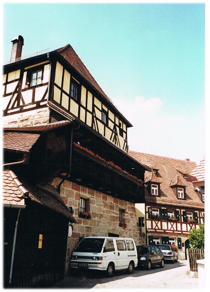 Der sog. Judenturm von 1430 war Teil der Stadtmauer, und erinnert an die jüdische Geschichte der Stadt Lauf an der Pegnitz.